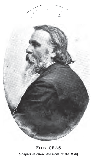 Fèlix Gras